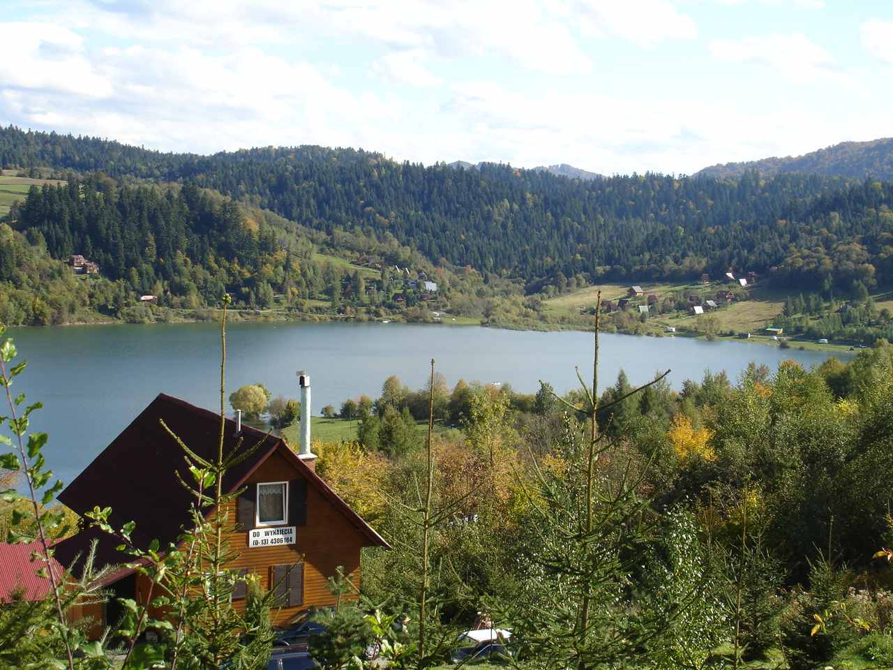 village Wolkowyja (Bieszczady mountains) Poland